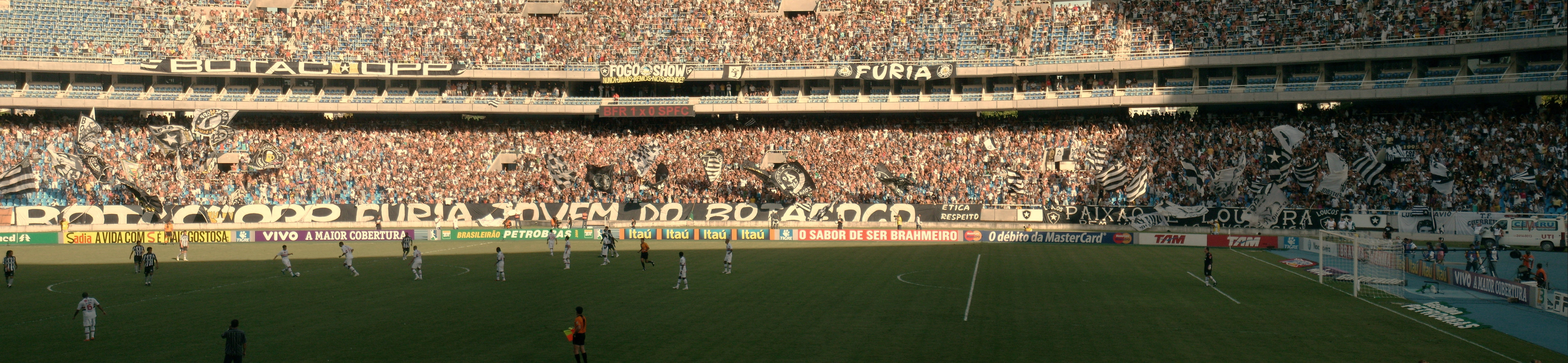 Torcida do Botafogo comemora o primeiro gol de Jóbson, na vitória por 3-2 contra o São Paulo, pela 36ª rodada do Campeonato Brasileiro de Futebol de 2009.